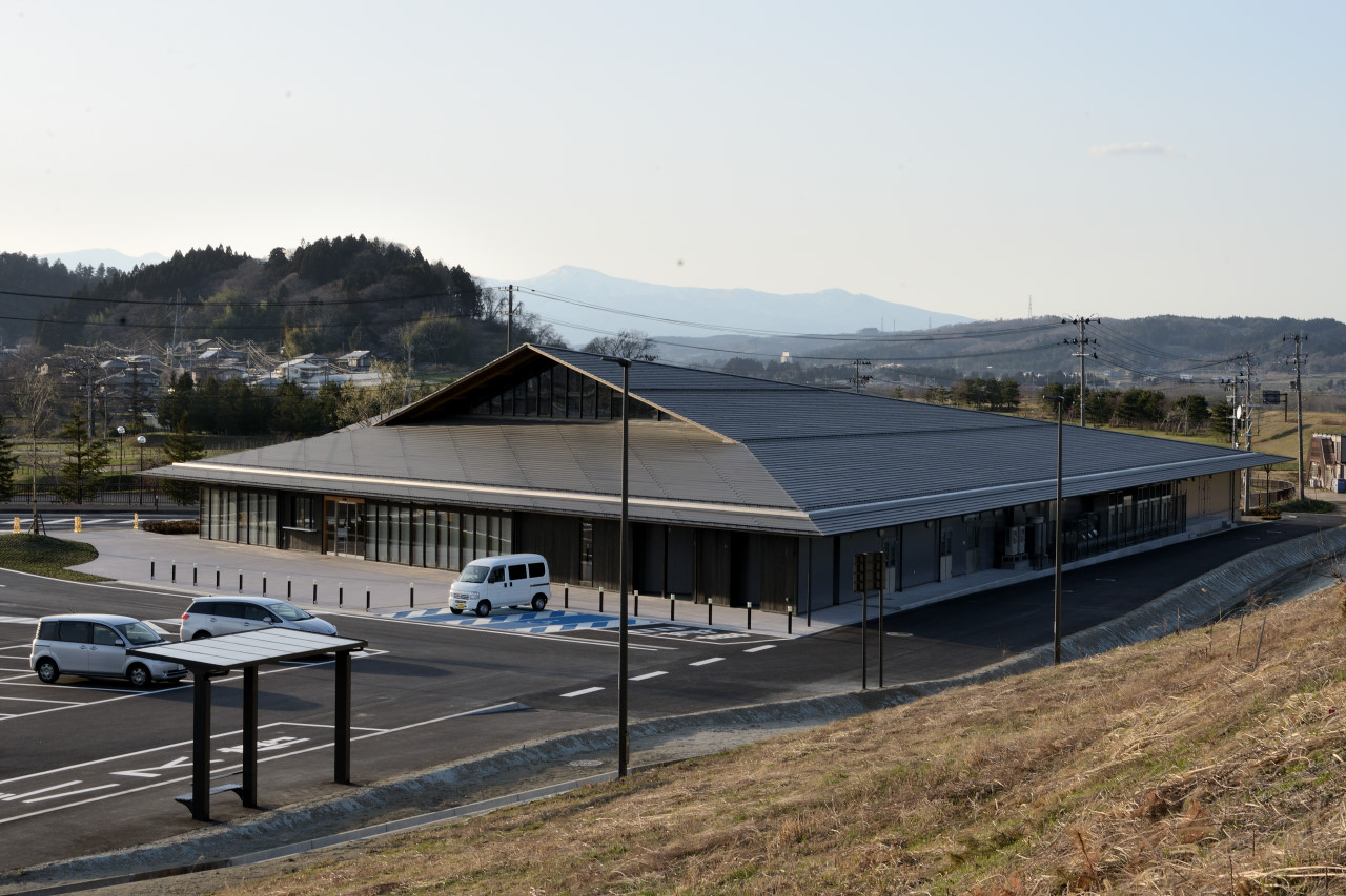 Hiraizumi, Roadside Station, Iwate, Japan. 岩手県にある道の駅「道の駅平泉」